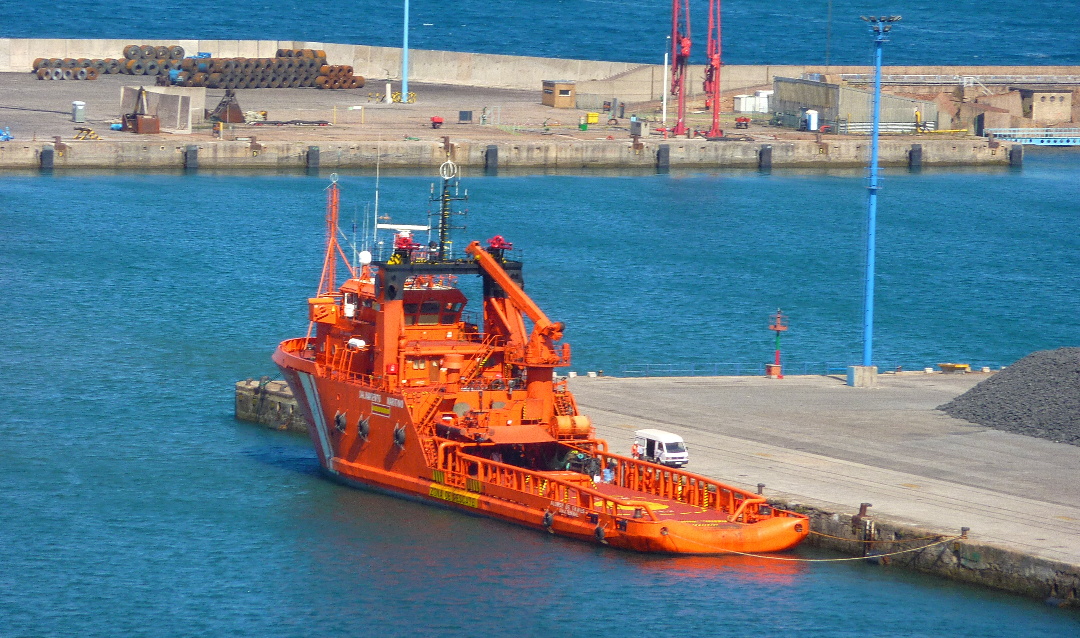 Buque remolcador de la Sociedad de Salvamento y Seguridad Marítima "Alonso de Chaves", BS-12.